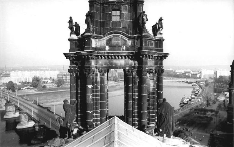 Dresden, Hofkirche, Figurenschmuck ADN-ZB Häßler 1.11.1987 Dresden: Figurenschmuck für Kathedrale- Mit vier neuen Figuren wurde der Balustradenschmuck der Kathedrale ergänzt. Zahlreiche Figuren waren in der Bombennacht des 13.2.1945 zerstört worden. Bildhauer des Bezirkes schufen sie neu.